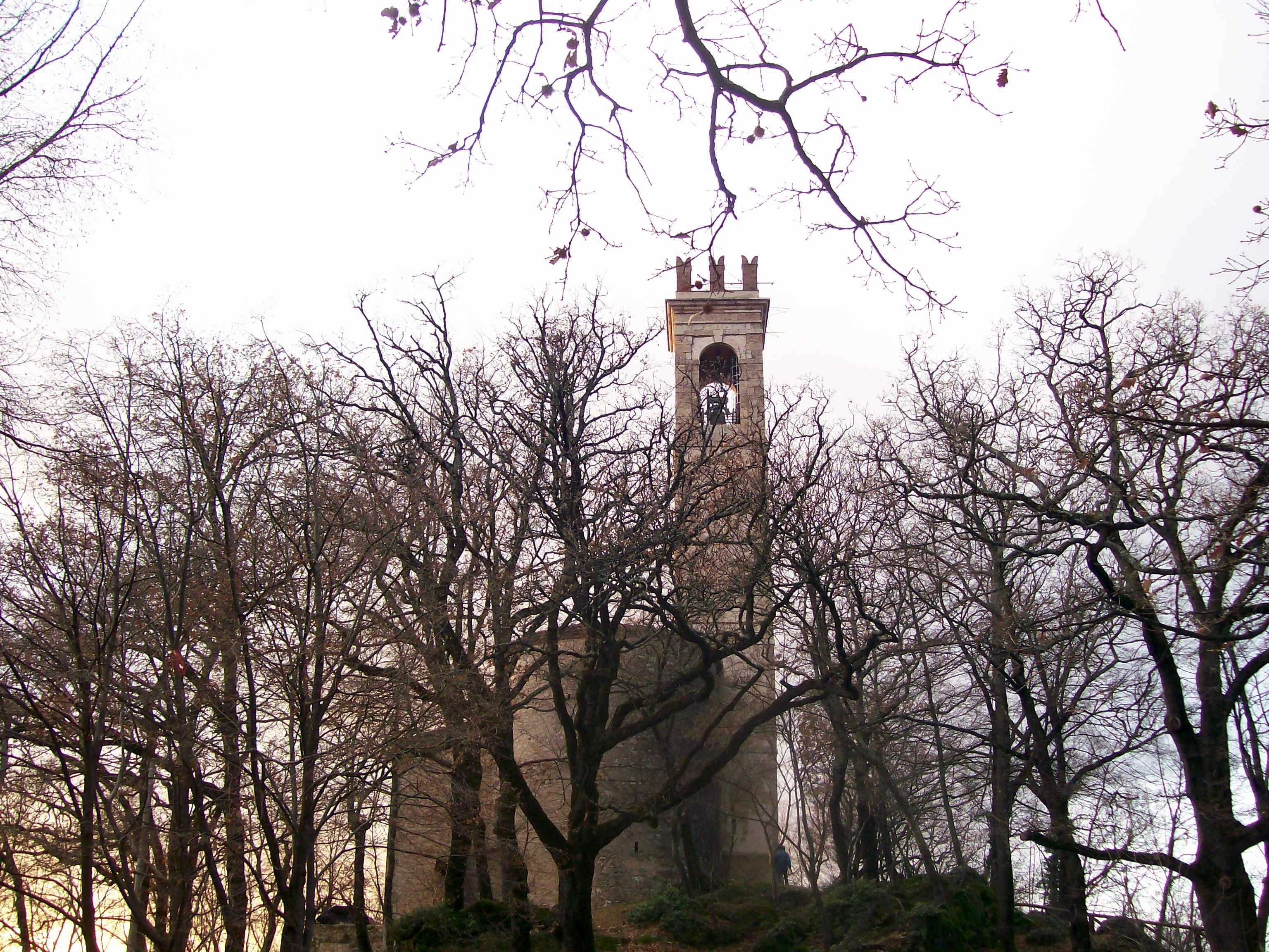 Abside e campanile della chiesa abbaziale dei Santi Pietro e Paolo nel comune di Badia Calavena (VR).